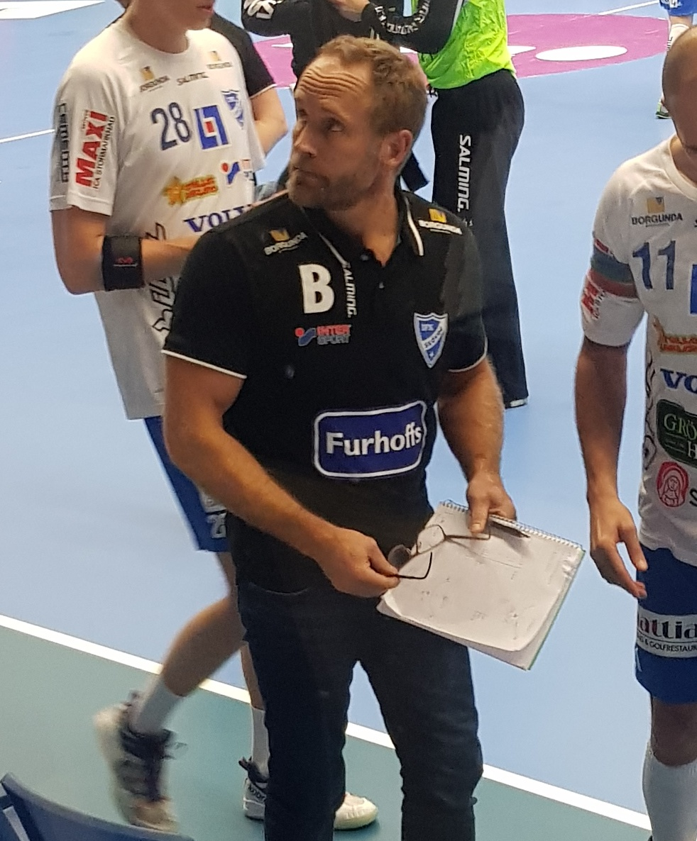 Mats Ljungkvist under en time-out med IFK Skövde